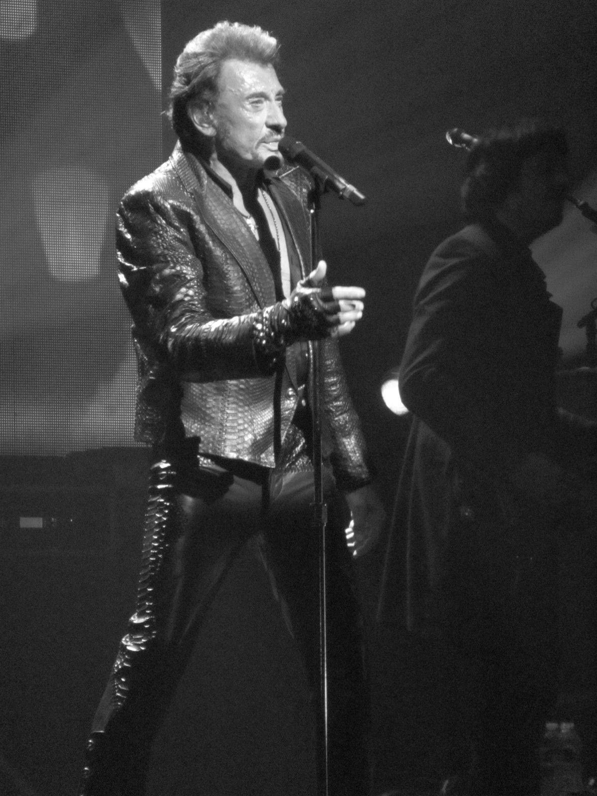 Le chanteur français Johnny Hallyday lors d'un concert au Beacon Theatre, le 7 octobre 2012.